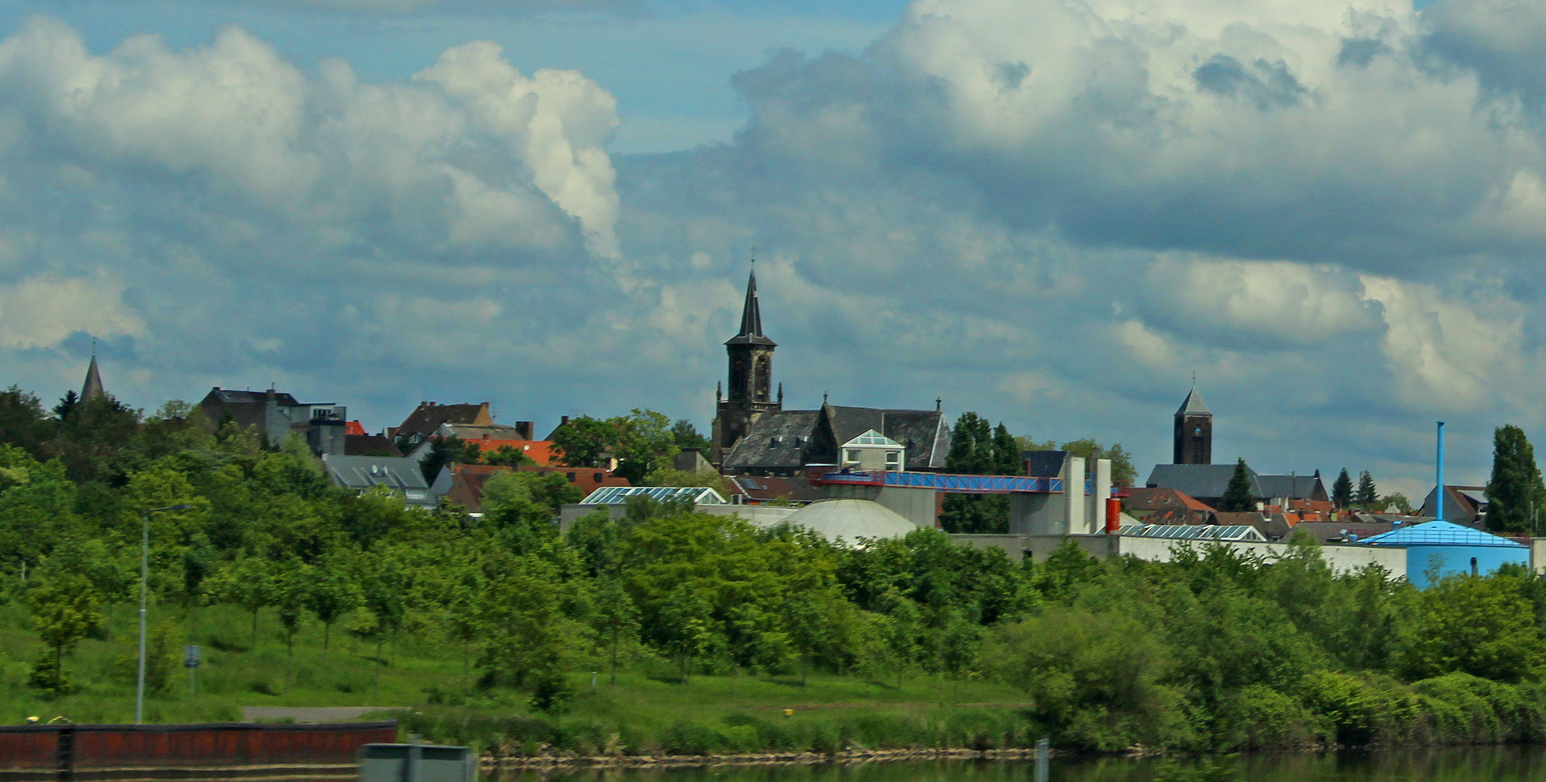 Blick auf Burbach, Stadt Saarbrücken, Saarland